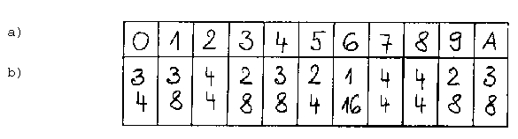 Rida taktimõõdu parameetris: a) rea elemendi number, b) improviseerides loodud taktimõõtude rida